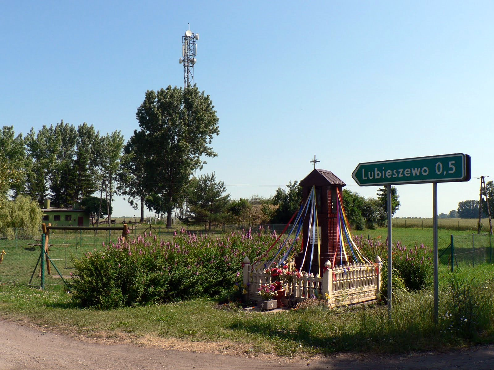 Skrzyżowanie i kapliczka w Lubieszewie